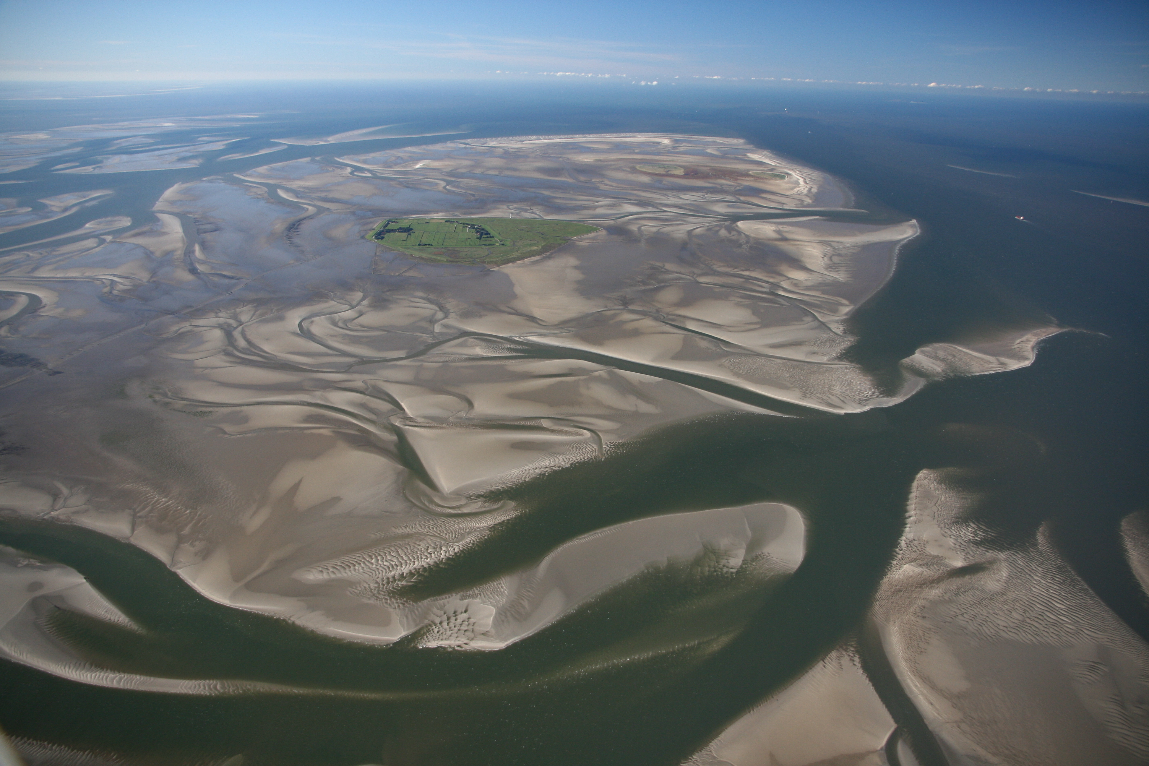 Luftbild: Insel Neuwerk